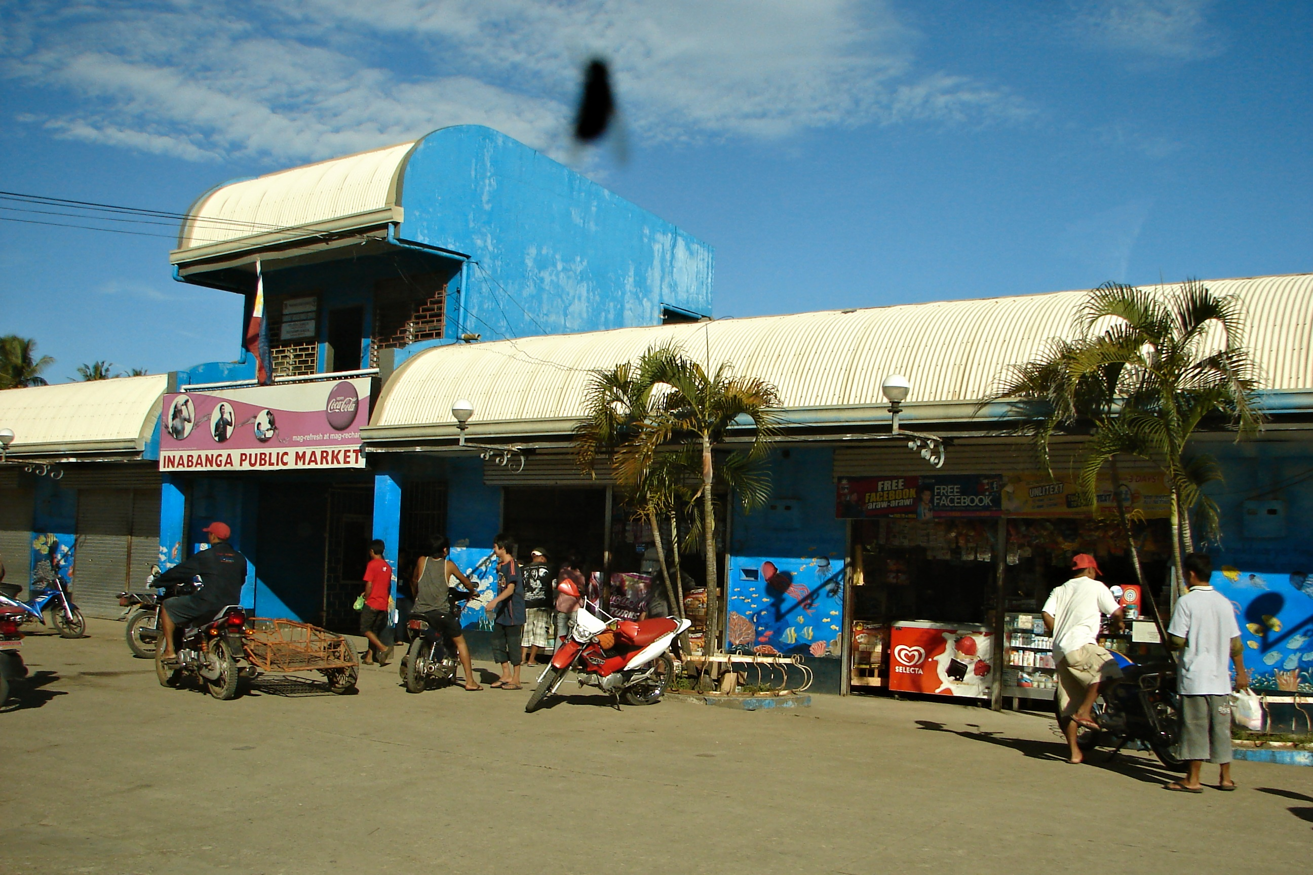 Public market of Inabanga, Bohol, Philippines